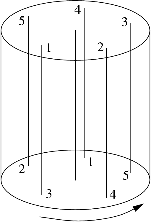 Seifert-gefaserter Volltorus